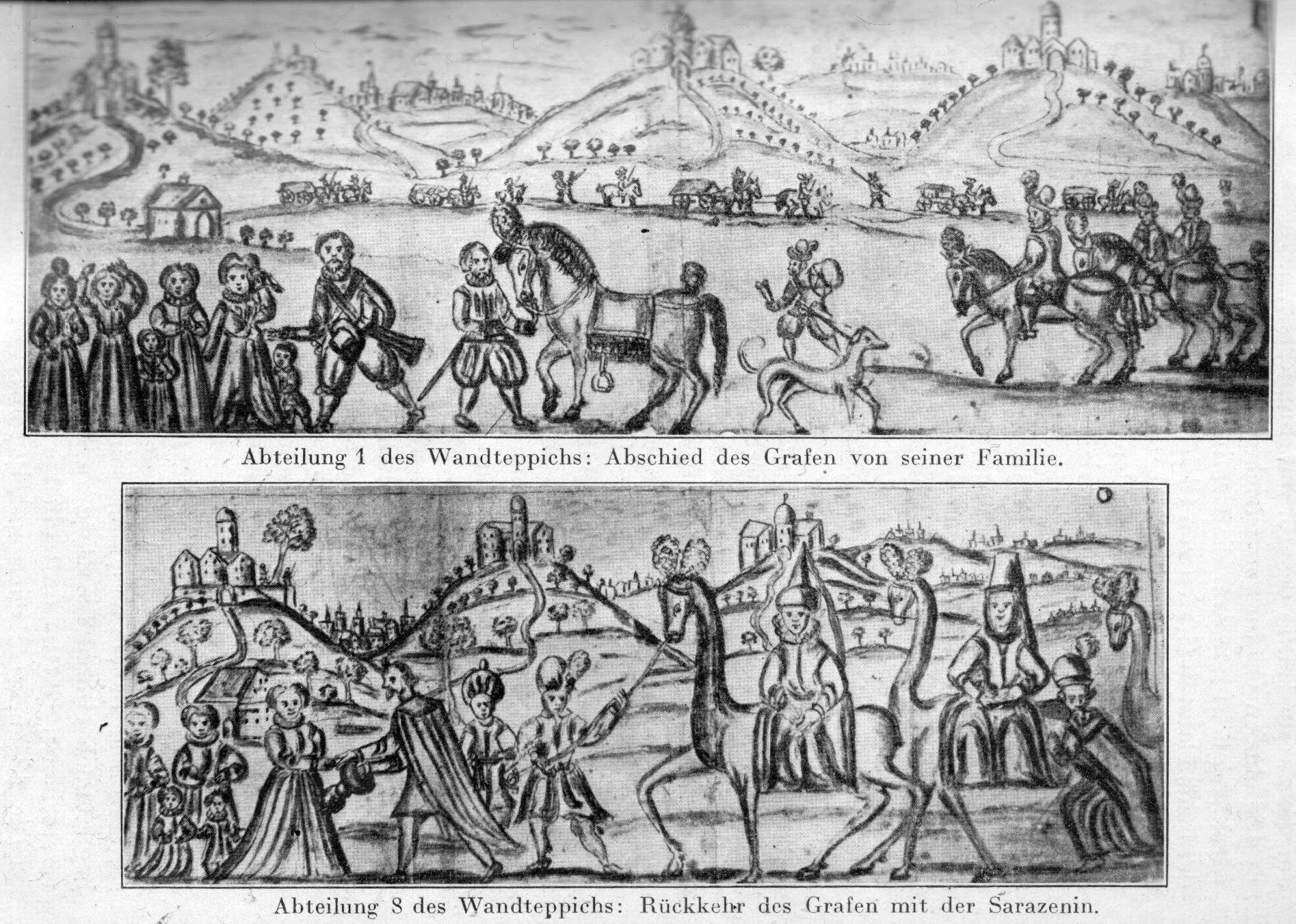 Abzeichnung eines Wandteppichs, der das Sagenmotiv des Grafen von Gleichen und seiner zwei Ehefrauen zeigt. Die Zeichnung wurde 1814 in Weimar nach Vorlage des Originalteppichs angefertigt und war einer Expertise des Kunstsachverständigen Vulpius beigefügt.